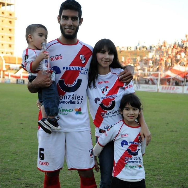 Tobías Albarracín